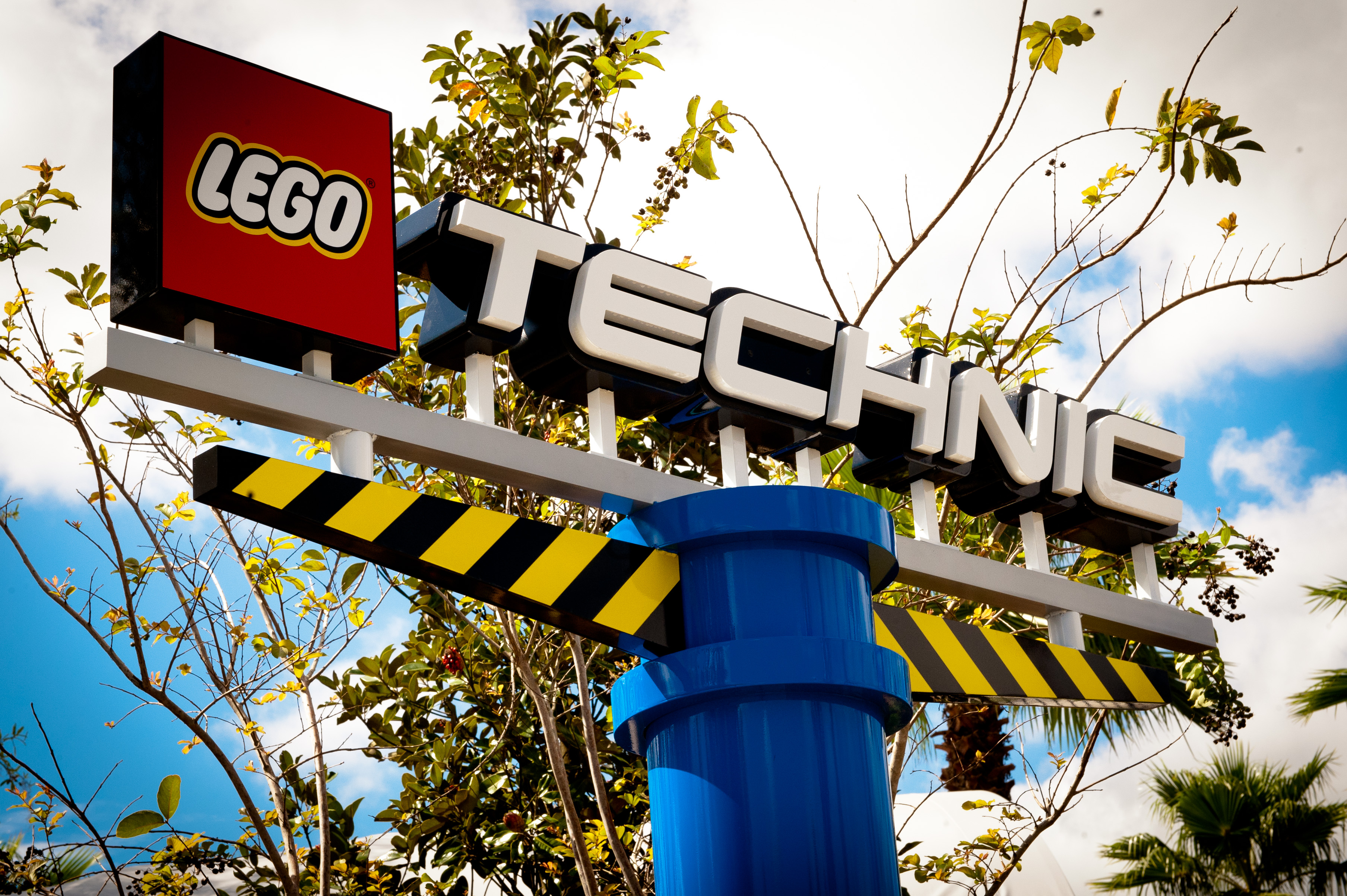 Legoland Florida